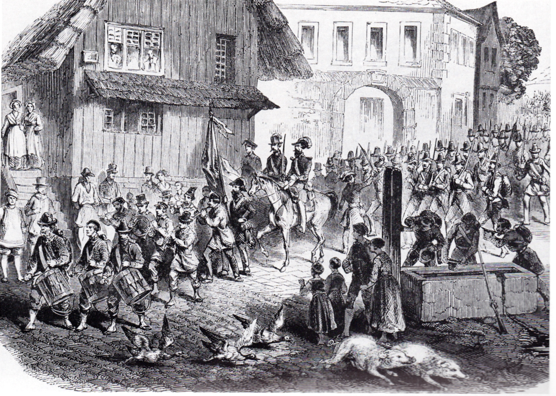 Struve und die Republikaner am 23. September 1848 auf dem Weg von Lörrach nach Mülheim; Holzschnitt nach einer Zeichnung von M. Elliot